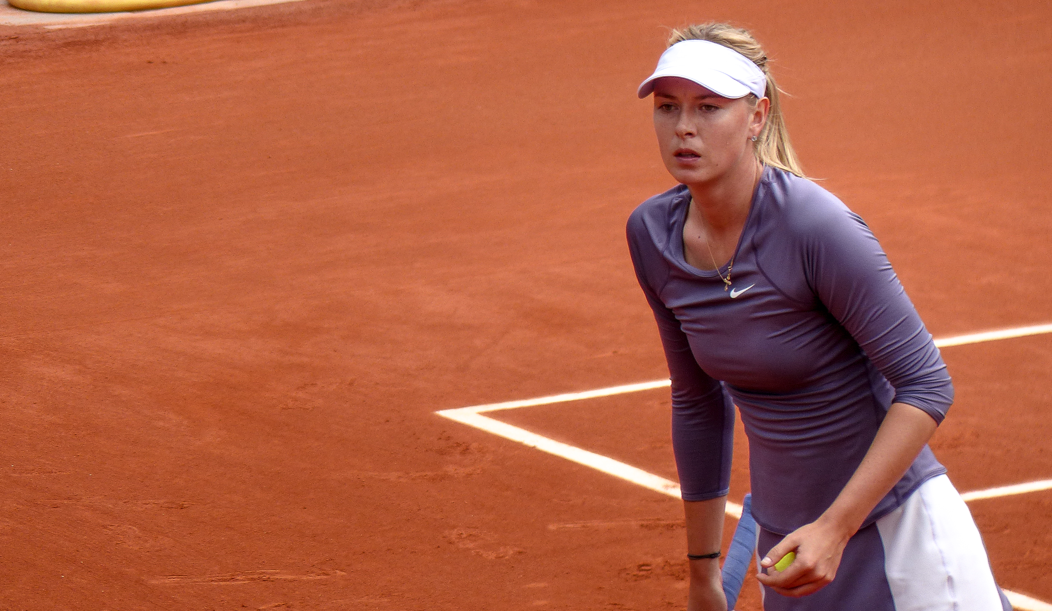 2ème tour Roland Garros 2013 : Maria Sharapova (RUS) vs Eugenie Bouchard (CAN)